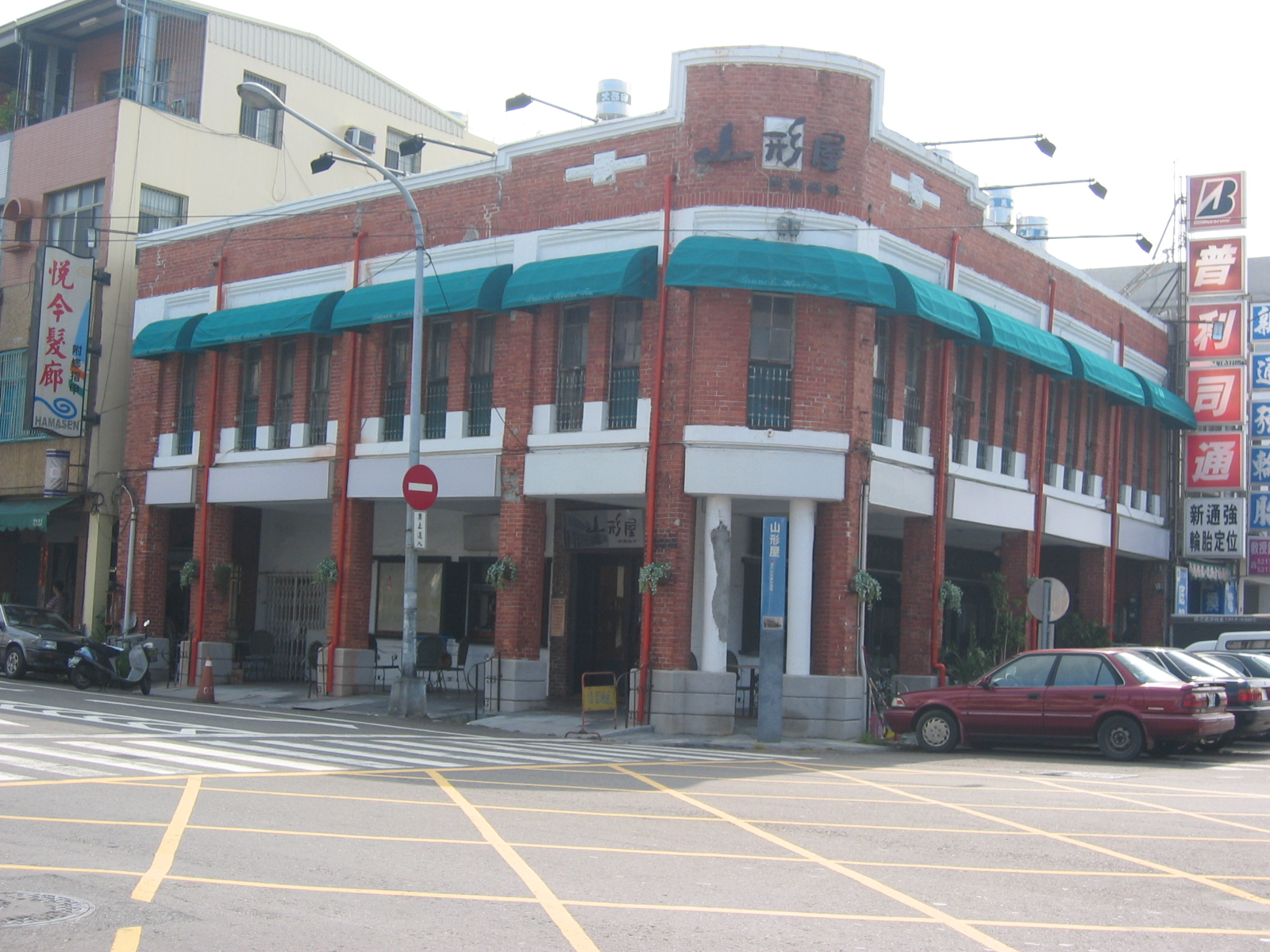 於2004年拍攝的山形屋。